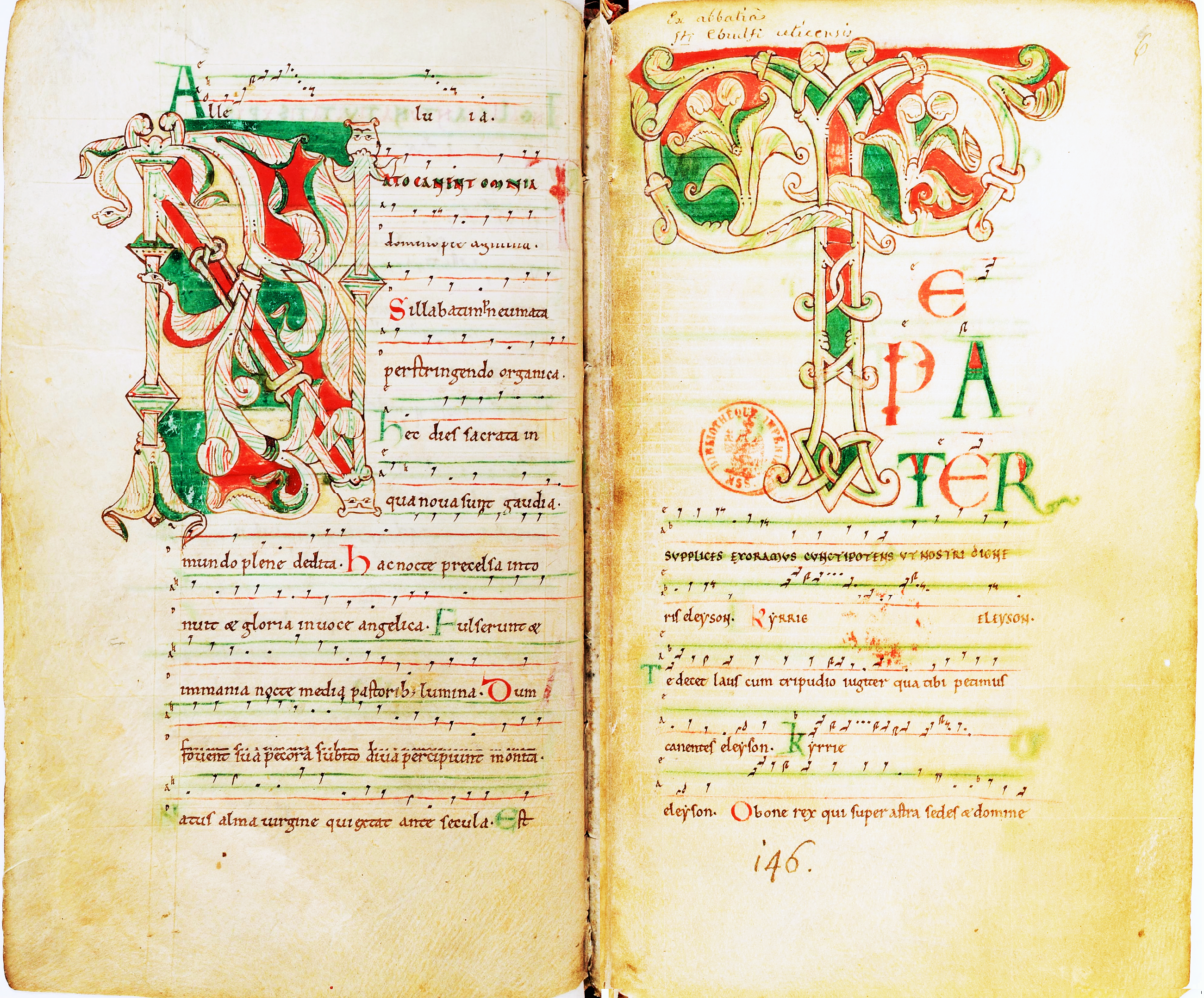 Abbaye de Saint-Evroult, Orne, Lettrines (montage de deux images retouchées provenant du domaine public: Traités musicaux de Gui d'Arezzo, graduel de Saint-Evroult, pages: 6v, 46v, bnf, gallica